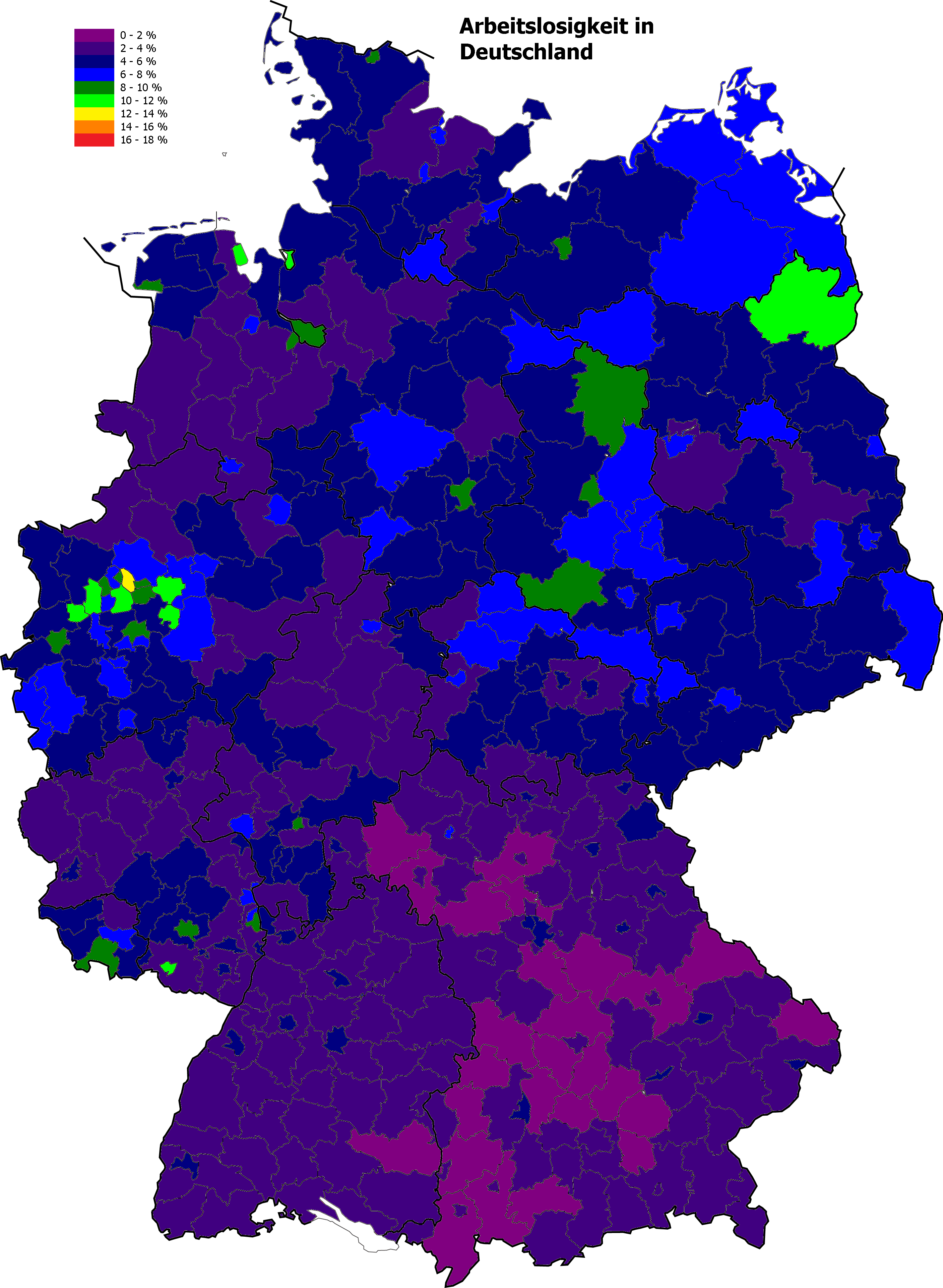 Arbeitslosenquoten nach Kreisen im Oktober 2019. 0-2% 2-4% 4-6% 6-8% 8-10% 10-12% 12-14% 14-16% 16-18%